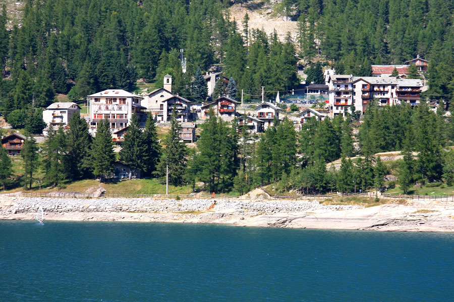 Panorama di Ceresole Reale (TO) in estate